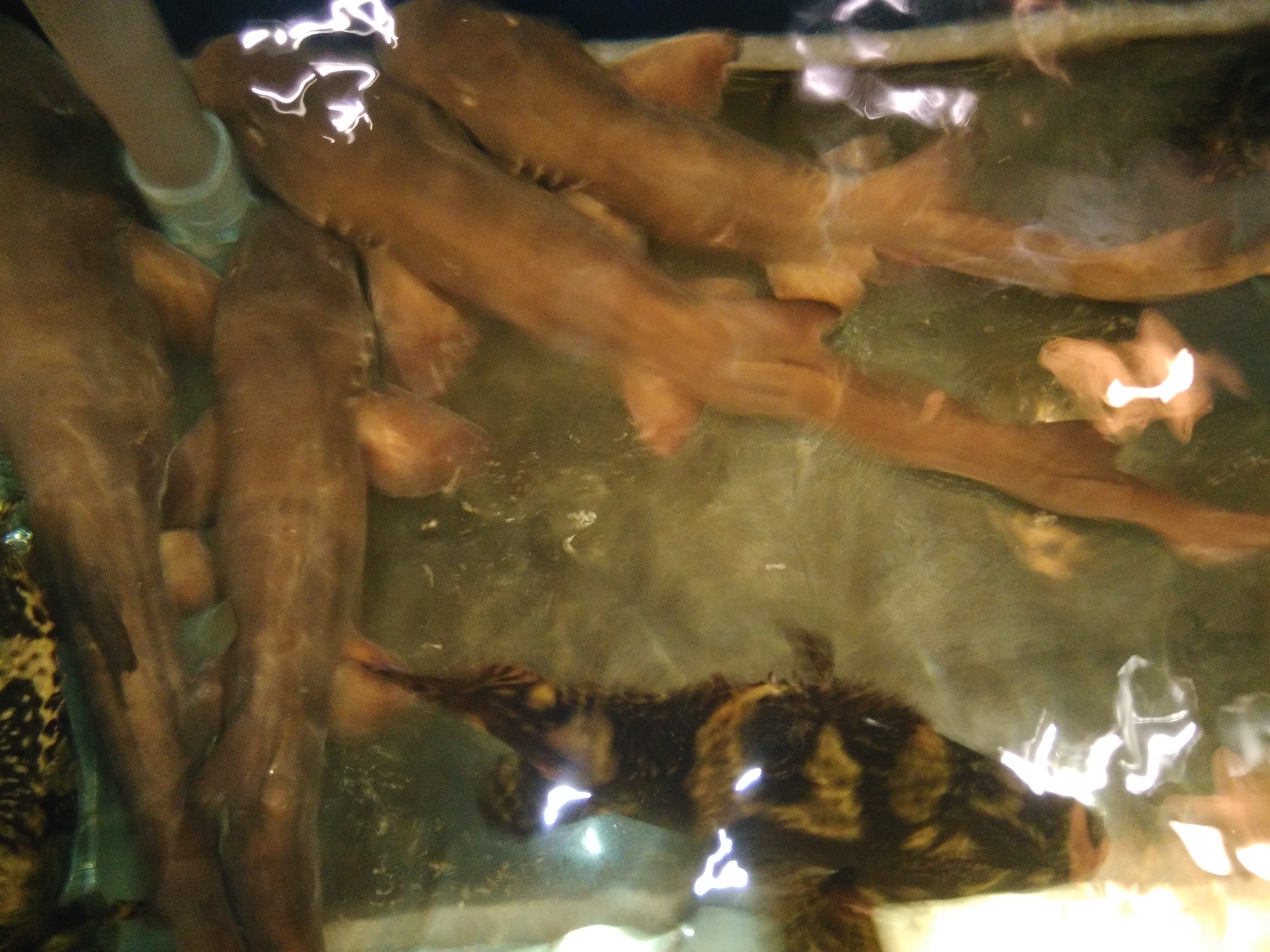 Cá chèo bẻo Gò Vấp